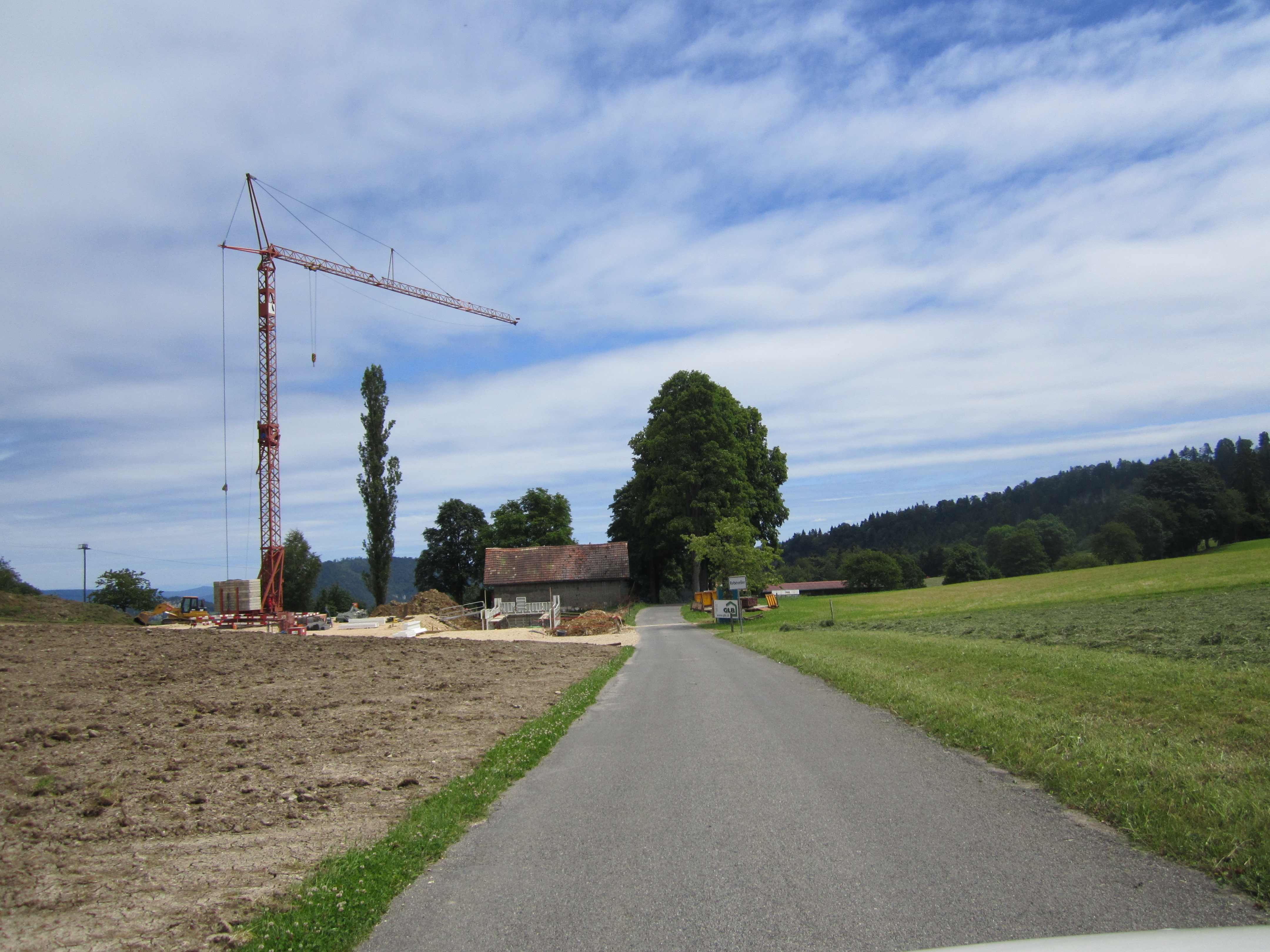 Vue de Rebévelier en arrivant depuis la route